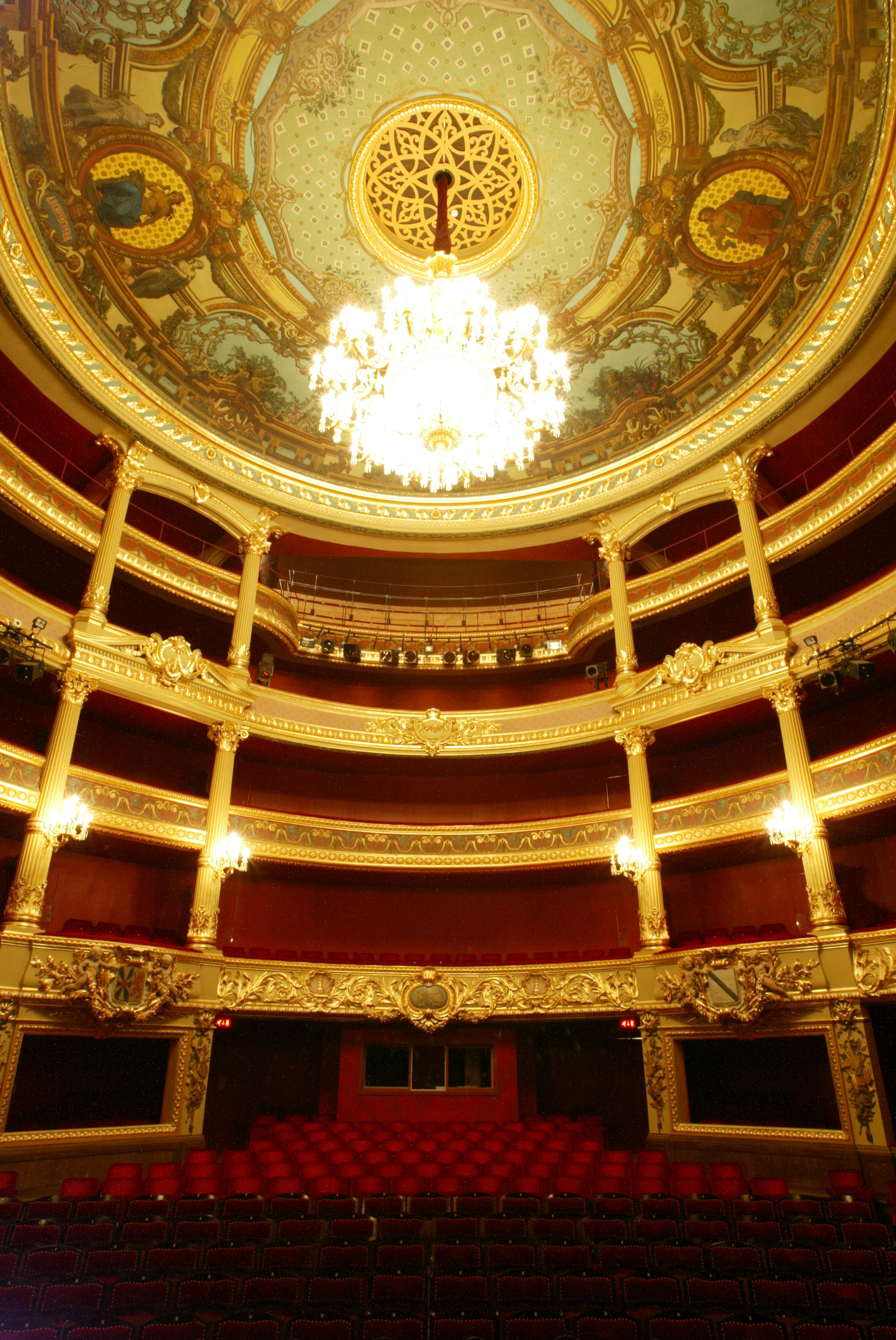 c2 0006 brugge zaal01 This is a possible Onroerend Erfgoed: Find the monument in the Monuments database: Unknown street in Brugge All Onroerend Erfgoed in Brugge Is this Onroerend Erfgoed? Yes No More images to work at in Category:Possible onroerend erfgoed.